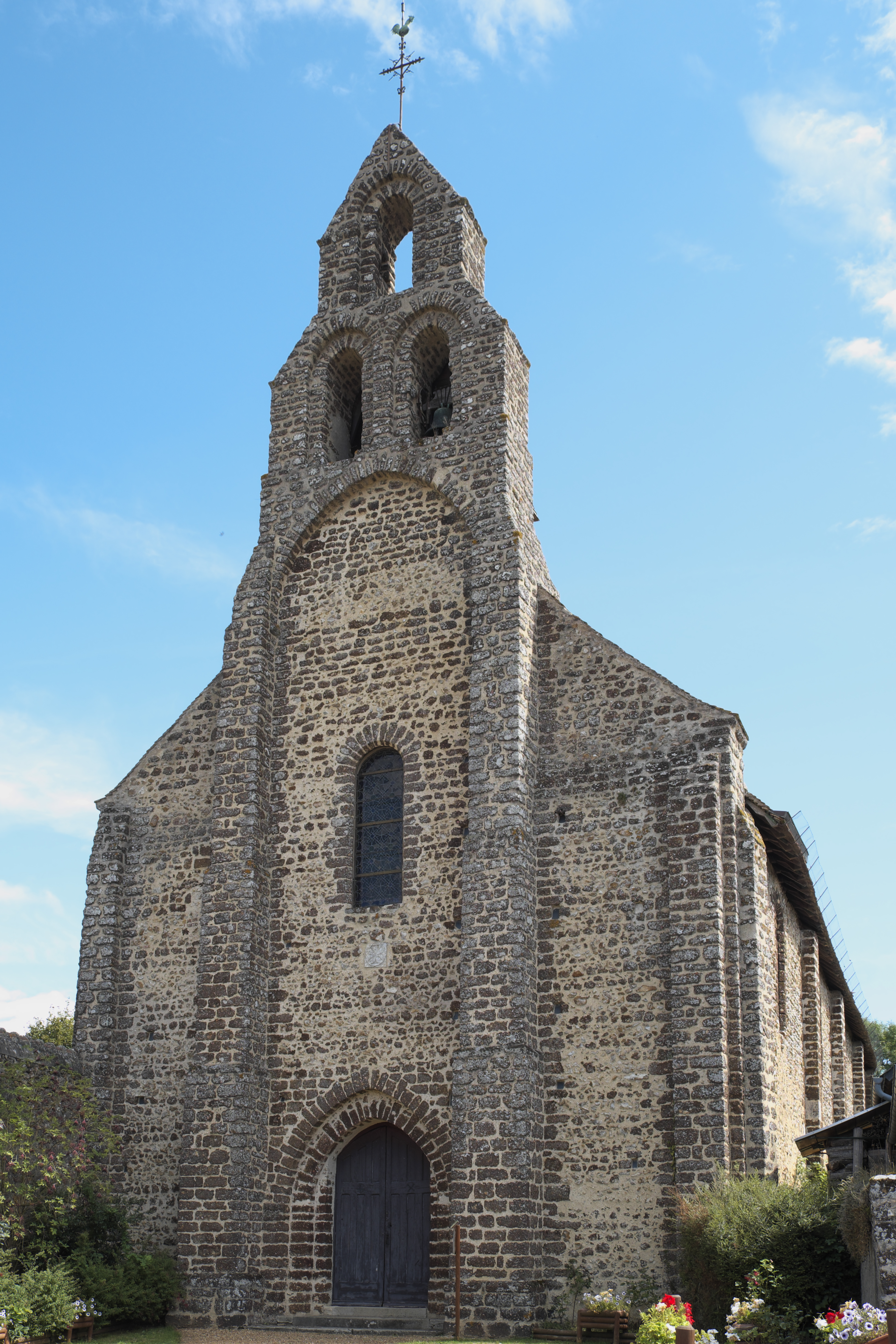 Katholische Kirche Notre-Dame in Arville im Département Loir-et-Cher (Centre-Val de Loire/Frankreich) .